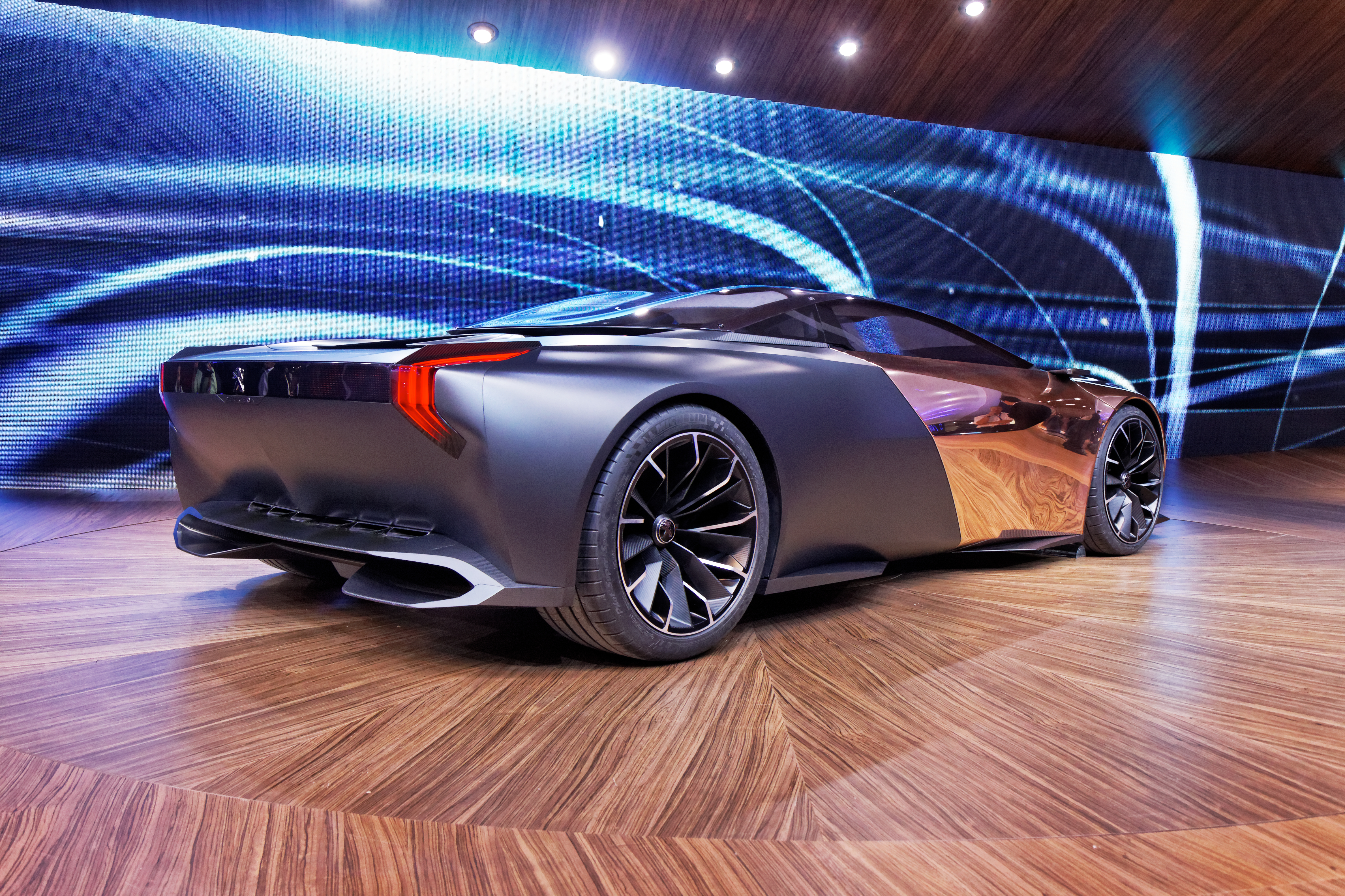 Une Peugeot Onyx présentée lors du Mondial de l'Automobile de Paris 2012.